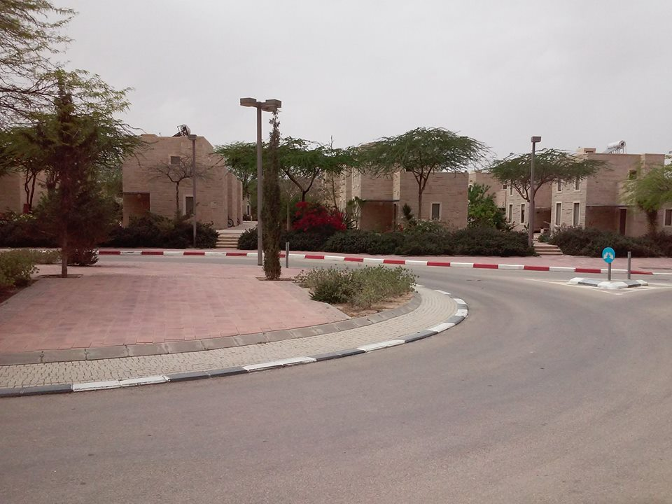 Kampus Uniwersytetu Ben Guriona w Sde Boker